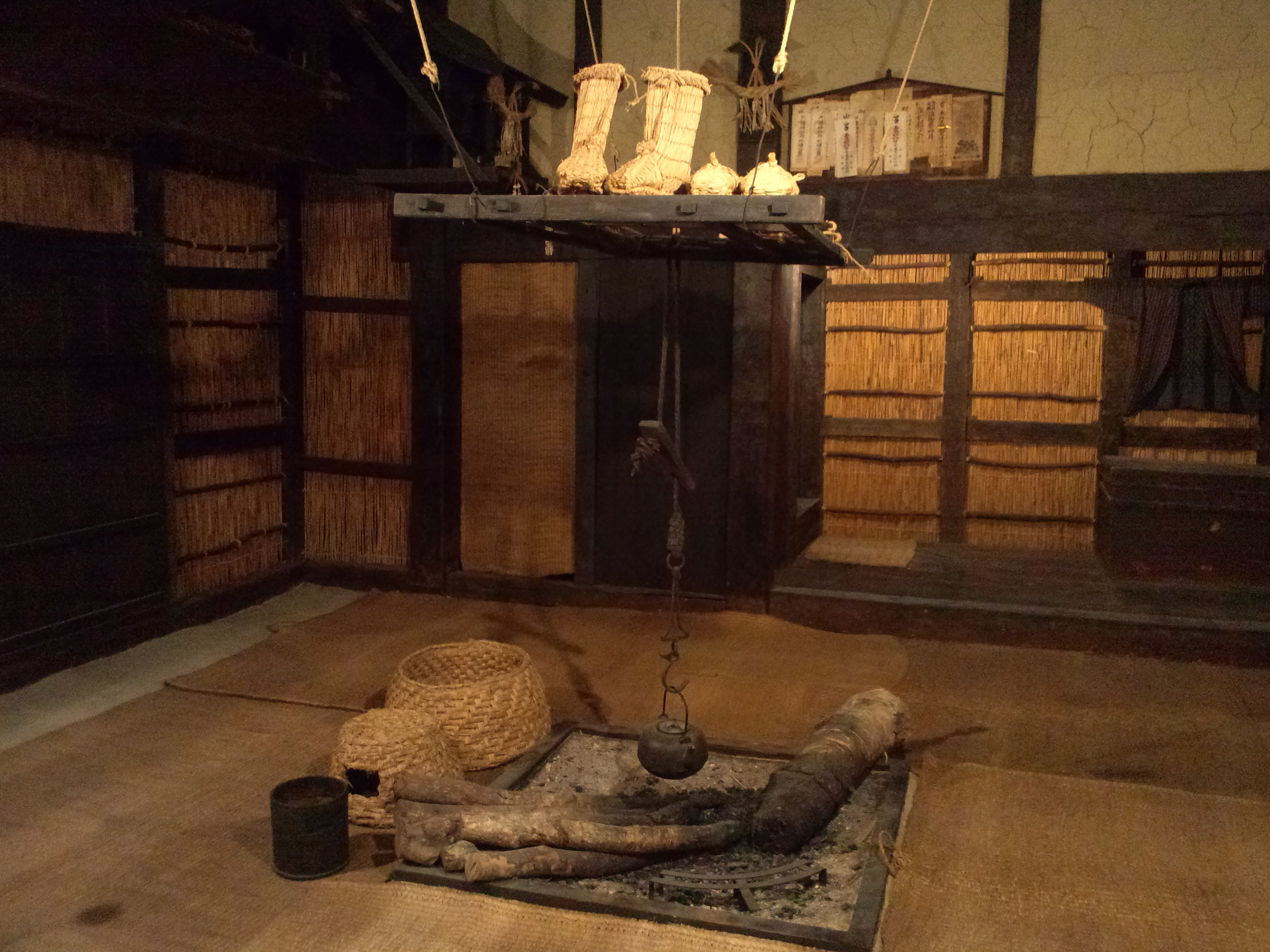 国立民族学博物館（大阪） 秋山郷のすまい（長野県、栄村、1975年収集）